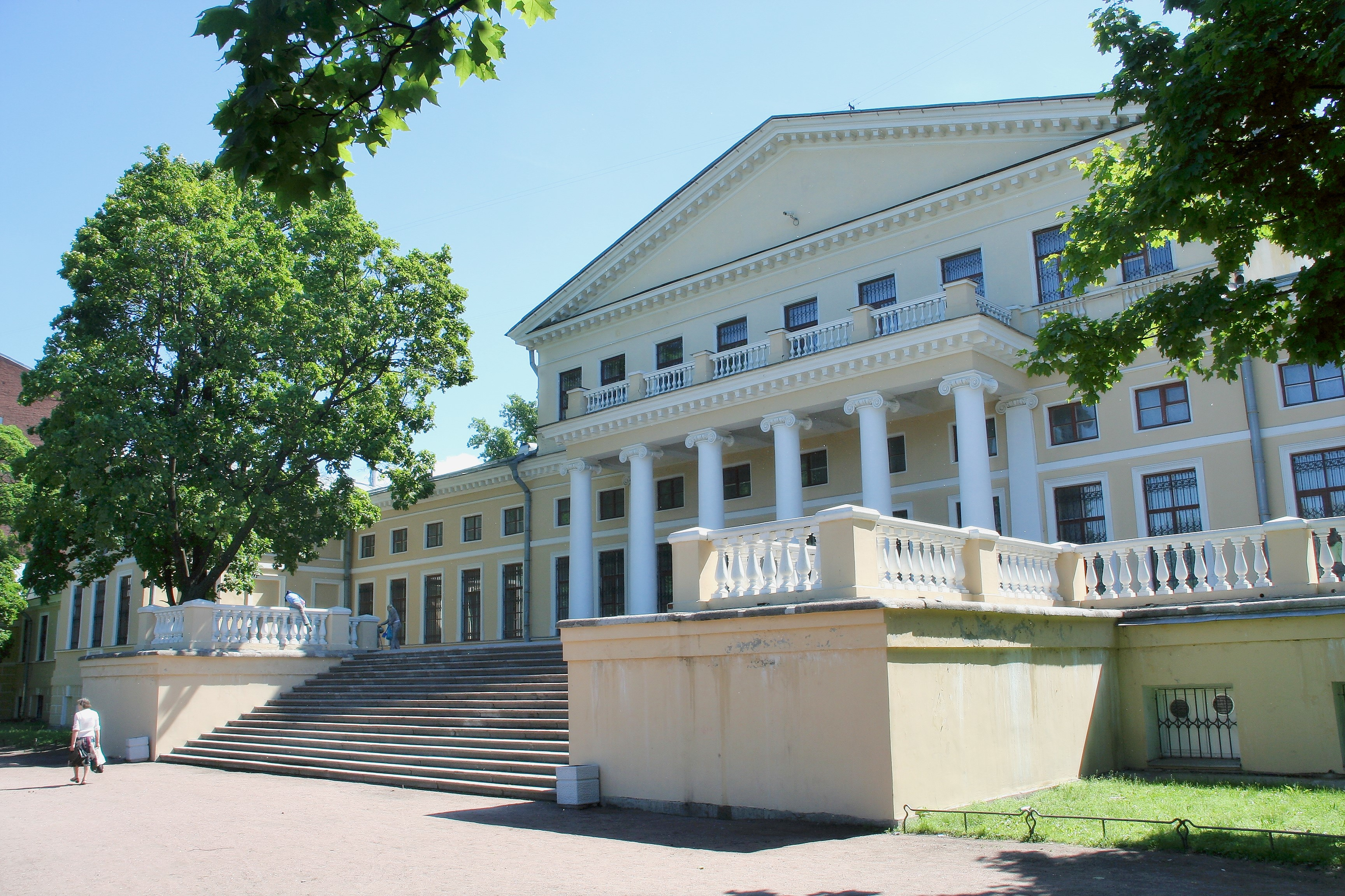 Jussupow Palais